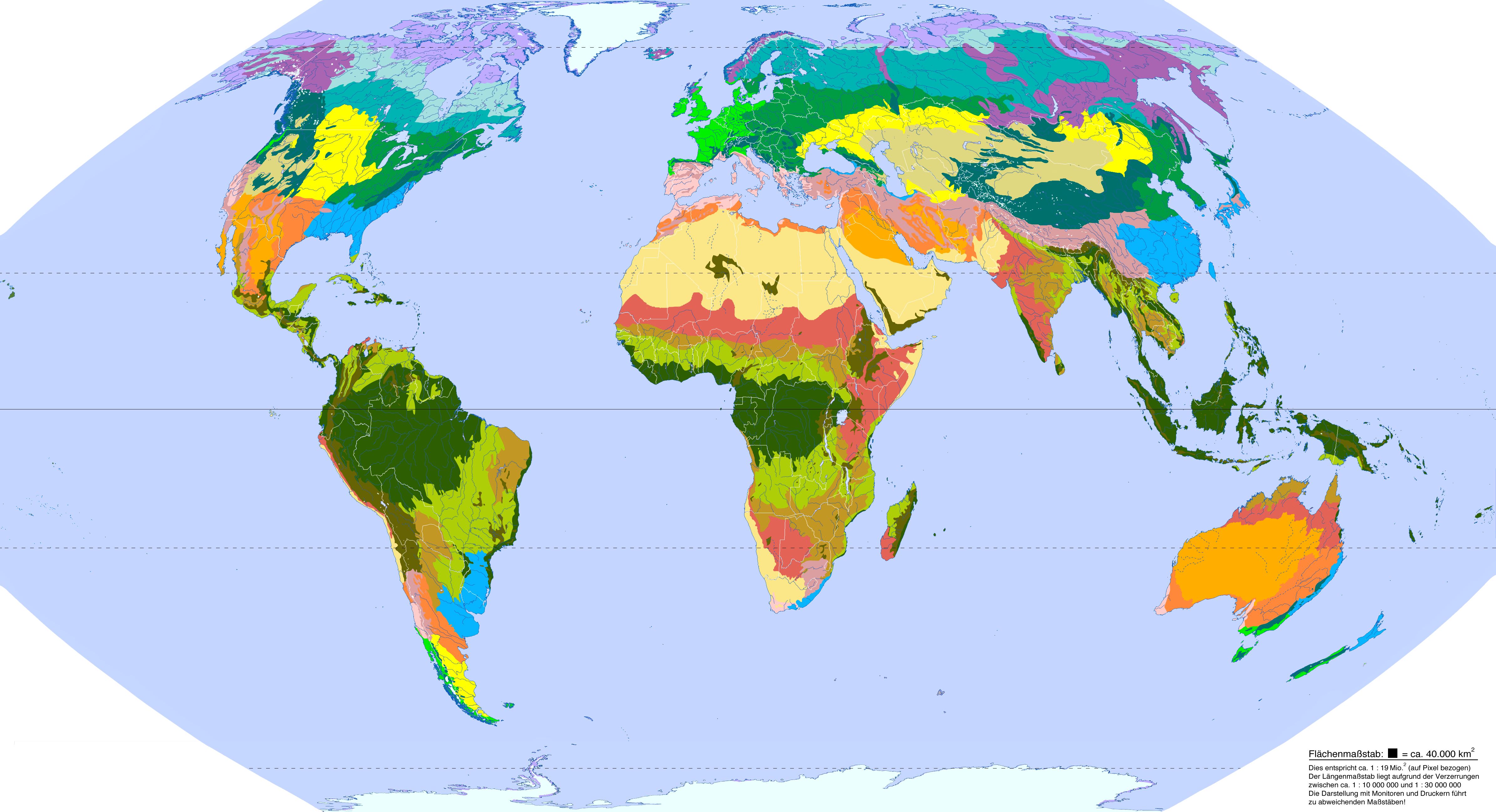 "Ecozones" - eher Vegetationszonen als Ökozonen! - der FAO